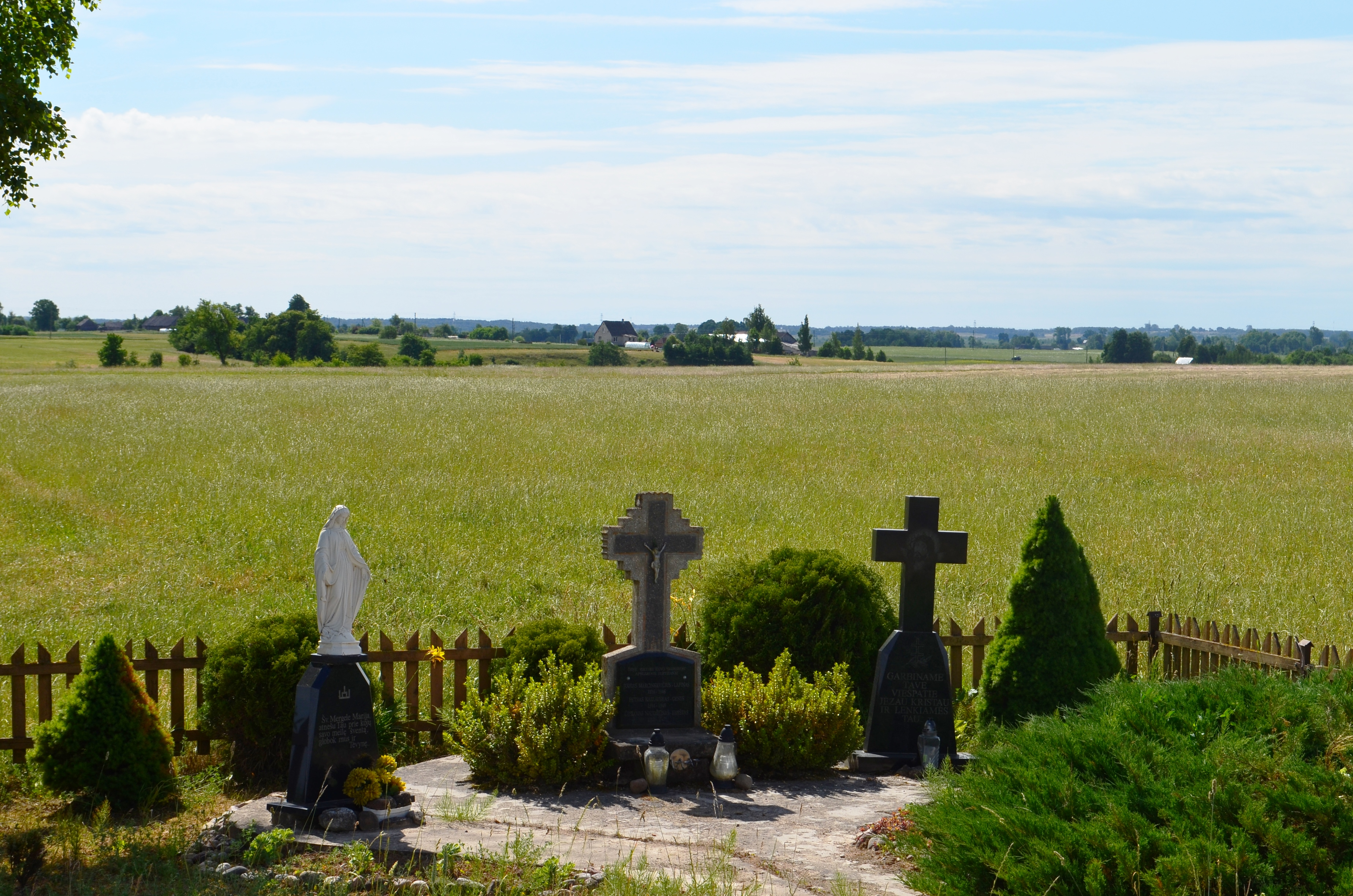 Partizanų memorialas, Vaiva, Prienų raj.